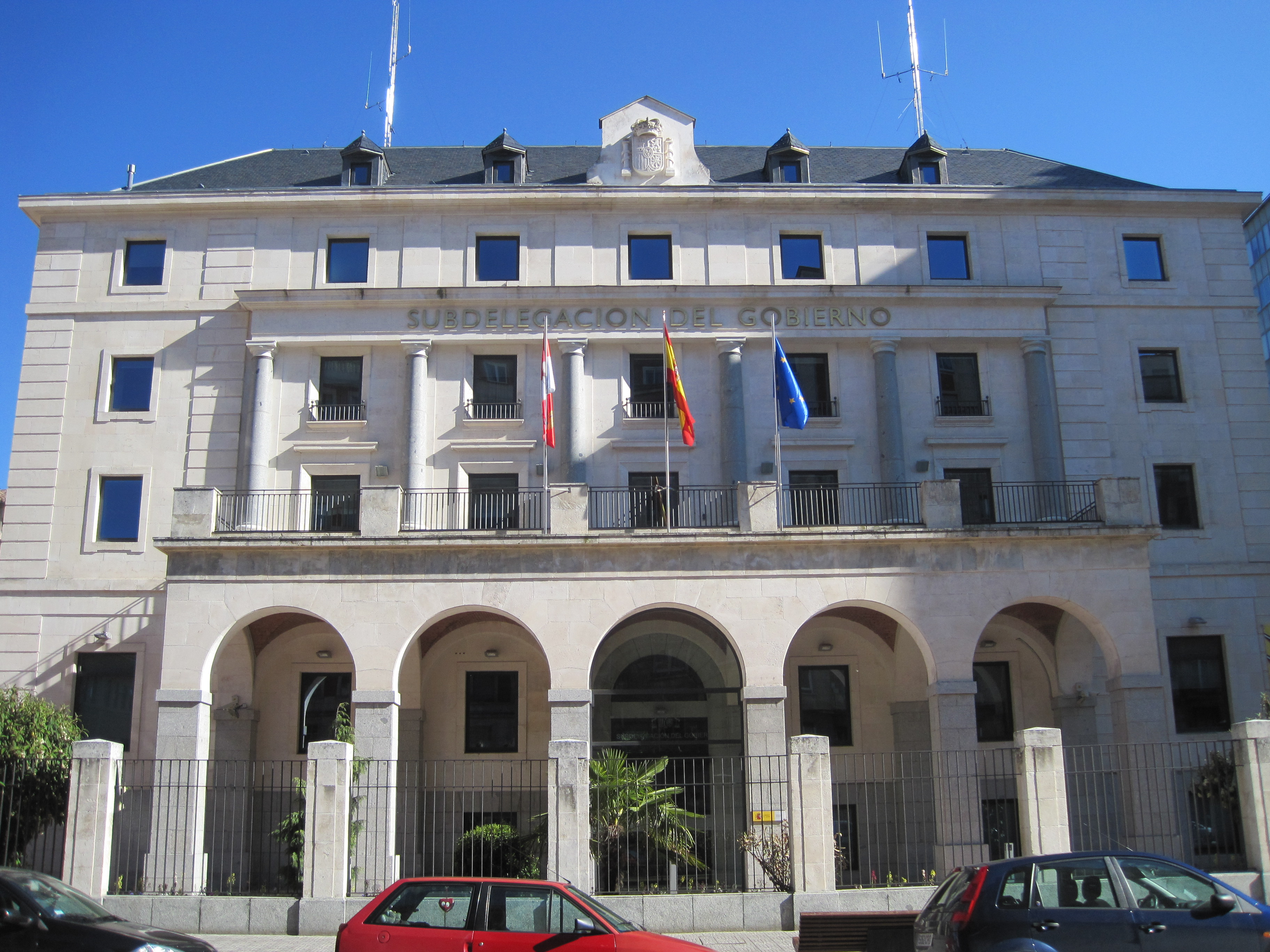 Vista frontal del edificio de la subdelegación del gobierno en Burgos (construido originalmente como sede del Banco de España).